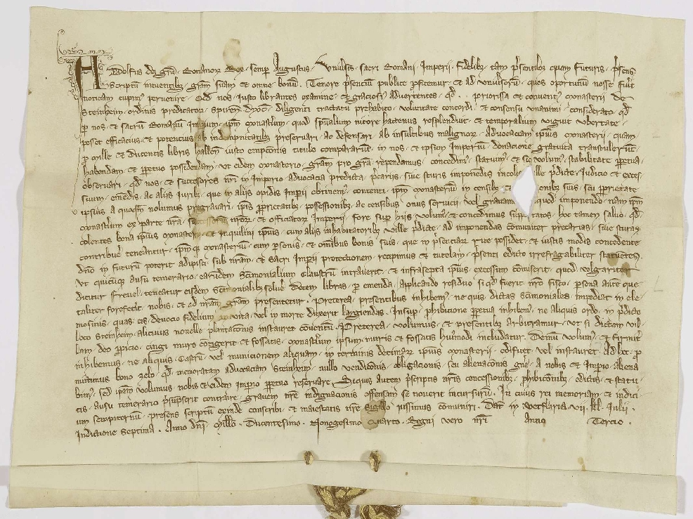 König Adolf von Nassau übernimmt die Vogtei des Kloster Steinheims